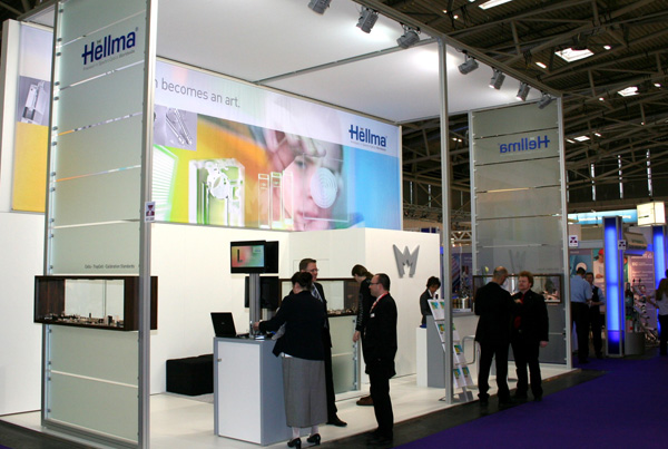 Hellma Messestand analytica 2008